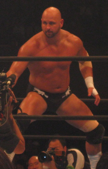 カール・アンダーソン（新日本プロレス、大阪大会6月16日）